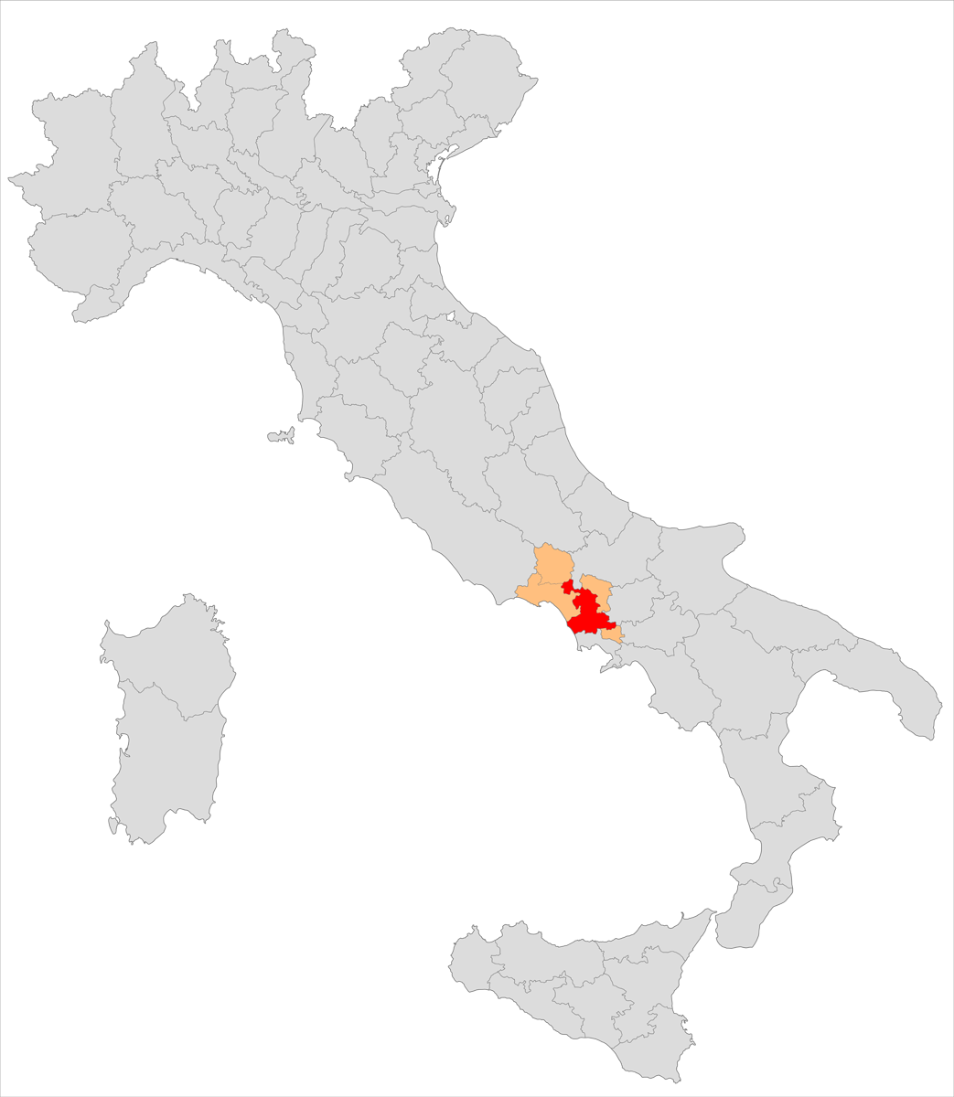 Il circondario di Caserta nella provincia di Terra di Lavoro (1860-1927)